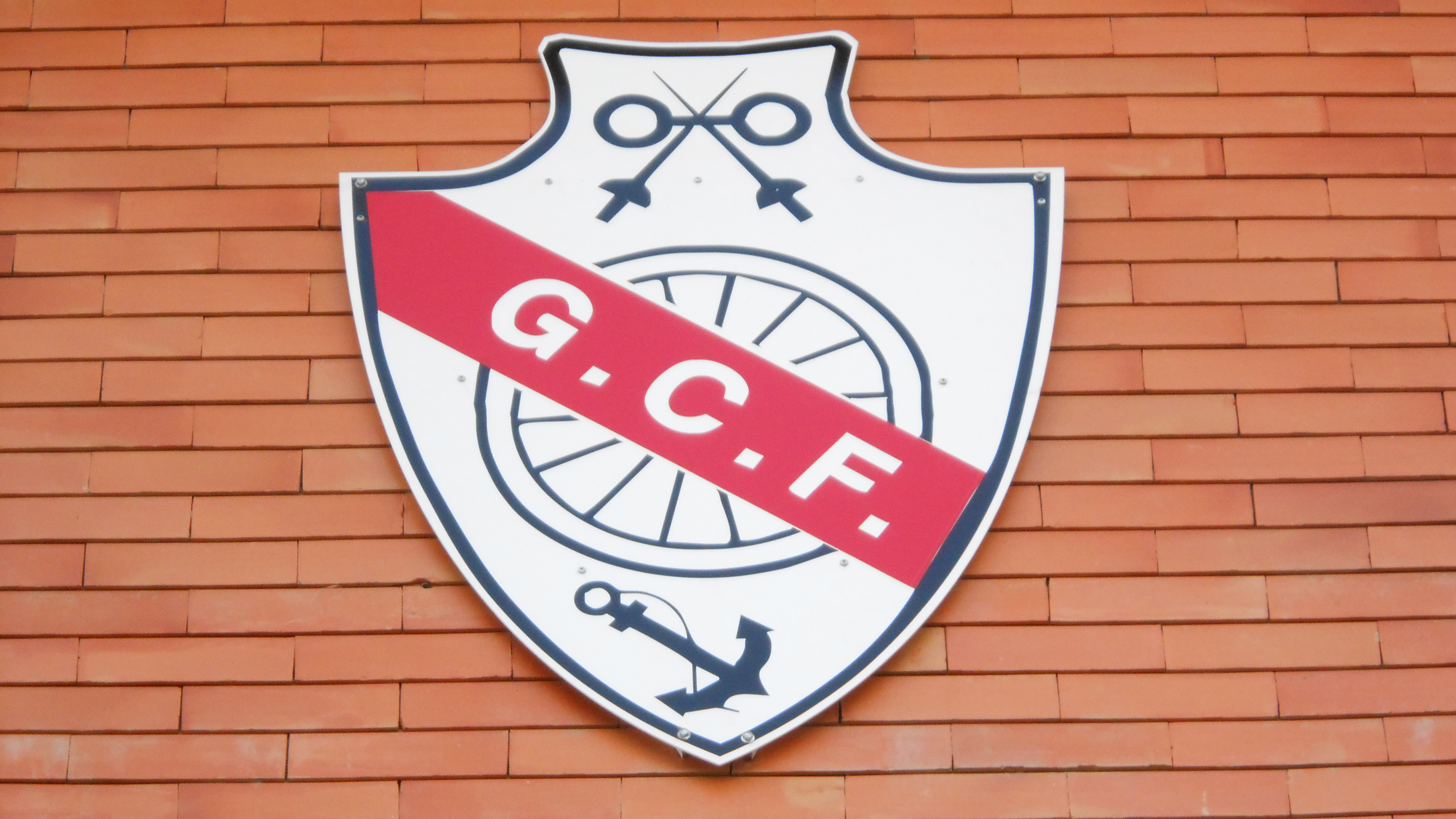 Vereinslogo am Clubhaus